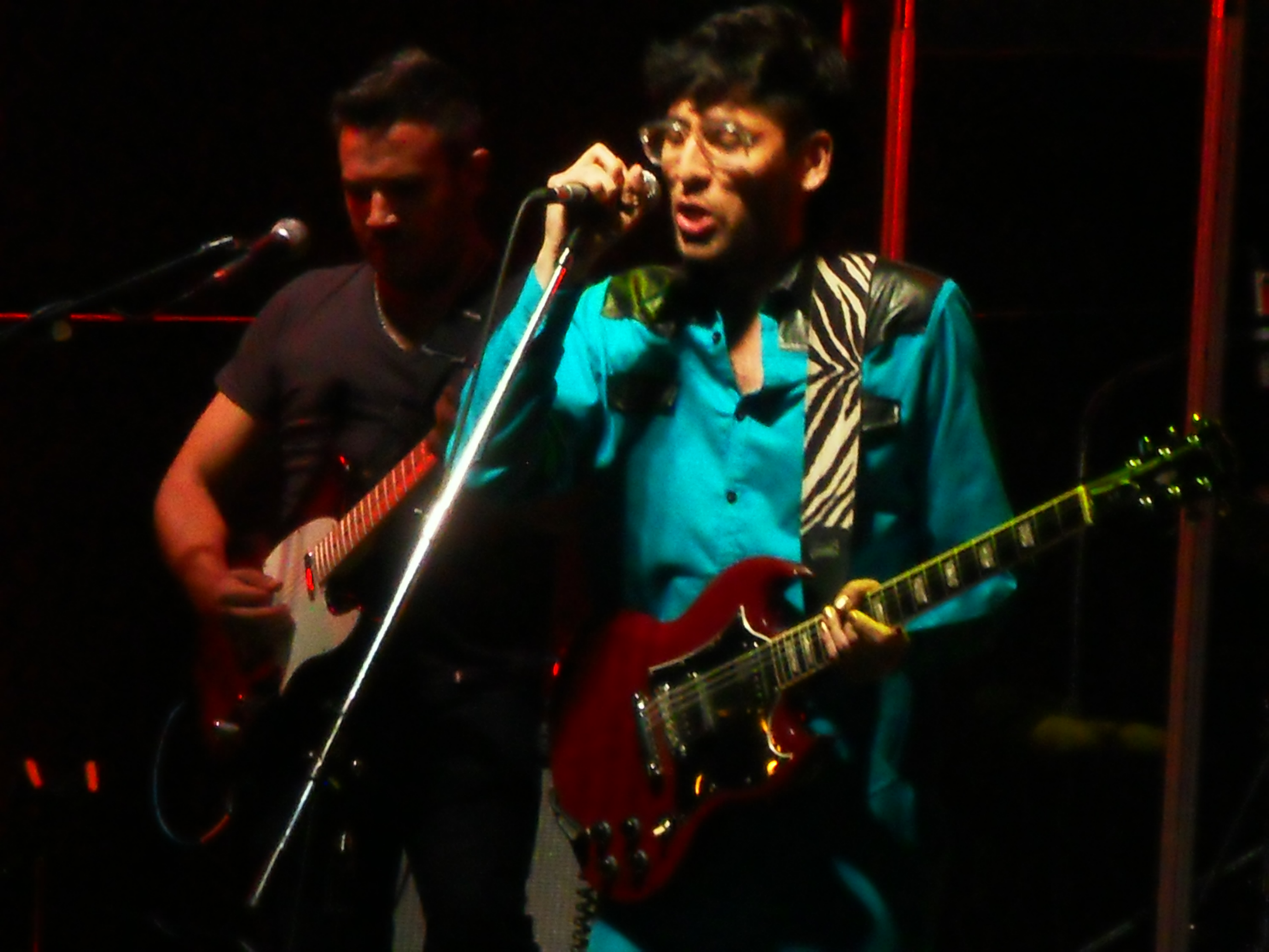 Gonzalo Aloras en Mendoza, abriendo el festival Solo se trata de vivir... desde siempre. Homenaje a Lito Nebbia. (15/12/2013)